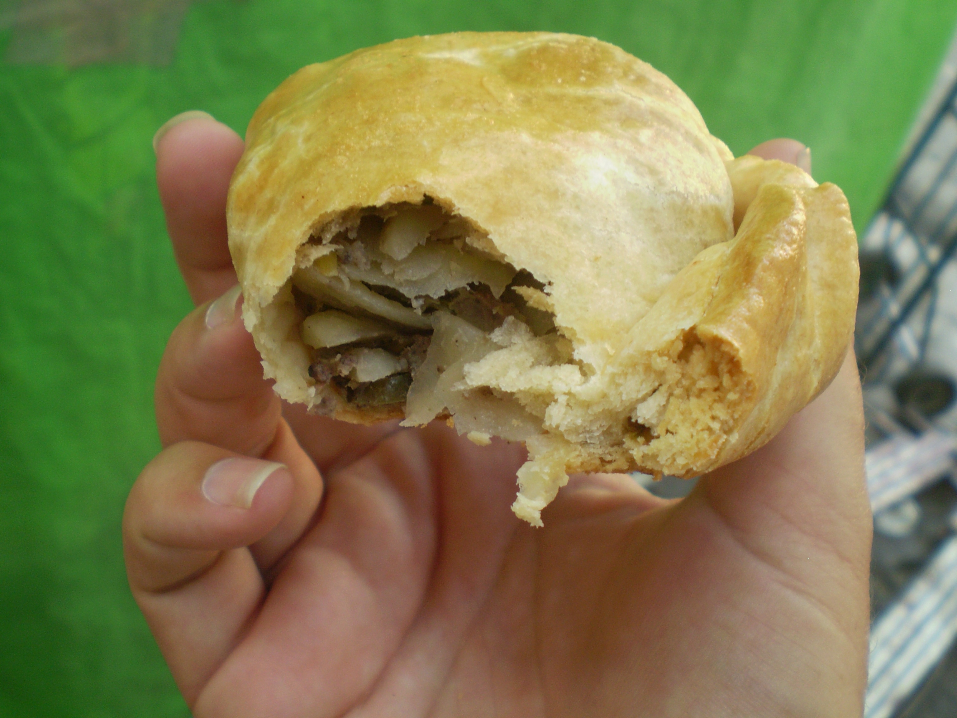 Pastie (paste) bought near Metro Revolución, Delegación Cuauhtémoc, Mexico City